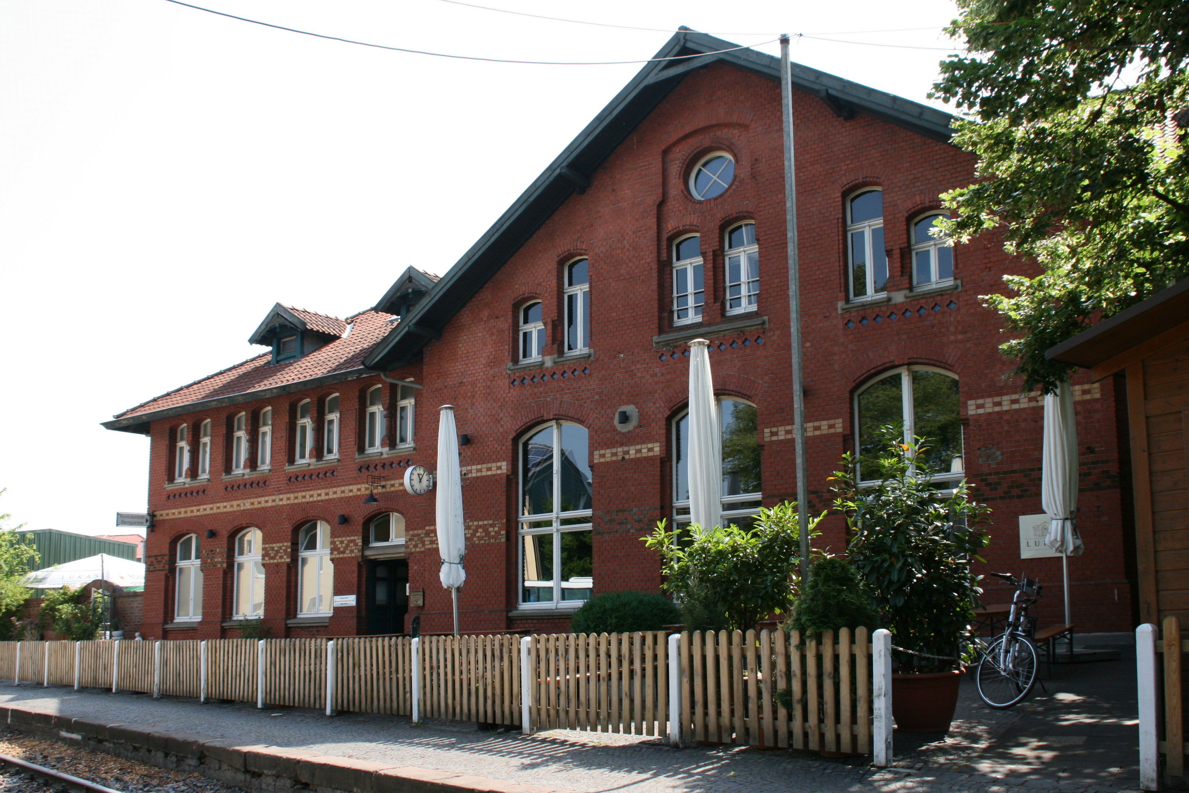 Alter Bahnhof der Ruhrtalbahn/Hespertalbahn, Prinz-Friedrich-Straße 1 in Essen-Kupferdreh